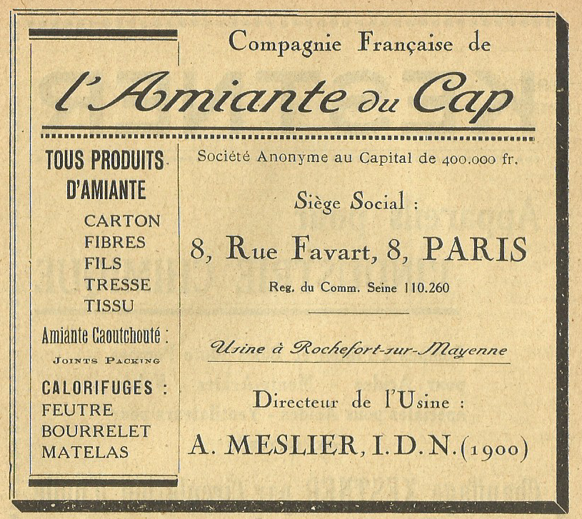 Compagnie française de l'amiante du Cap, Rochefort-Andouillé, France